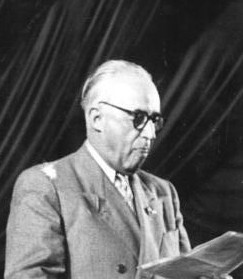 Title: Berlin, III. SED-Parteitag, Rede Mintscho Neitschev Factual corrections and alternative descriptions are encouraged separately from the original description. Additionally errors can be reported at this page to inform the Bundesarchiv. Original historic description: III.Parteitag der SED vom 20.-22.7.1950. Vom 20.-22.7.1950 findet in Berlin in der Werner-Seelenbinderhalle der III.Parteitag der Sozialistischen Einheitspartei Deutschlands statt.Letzter Tag des Parteitages der SED-24.7.1950- UBz: Dr. Mintscho Neitschev, Aussenminister der Volksrepublik Bulgarien. Aufn.: Illus-Quaschinsky 139 Gr 7294-50 24.7.1950